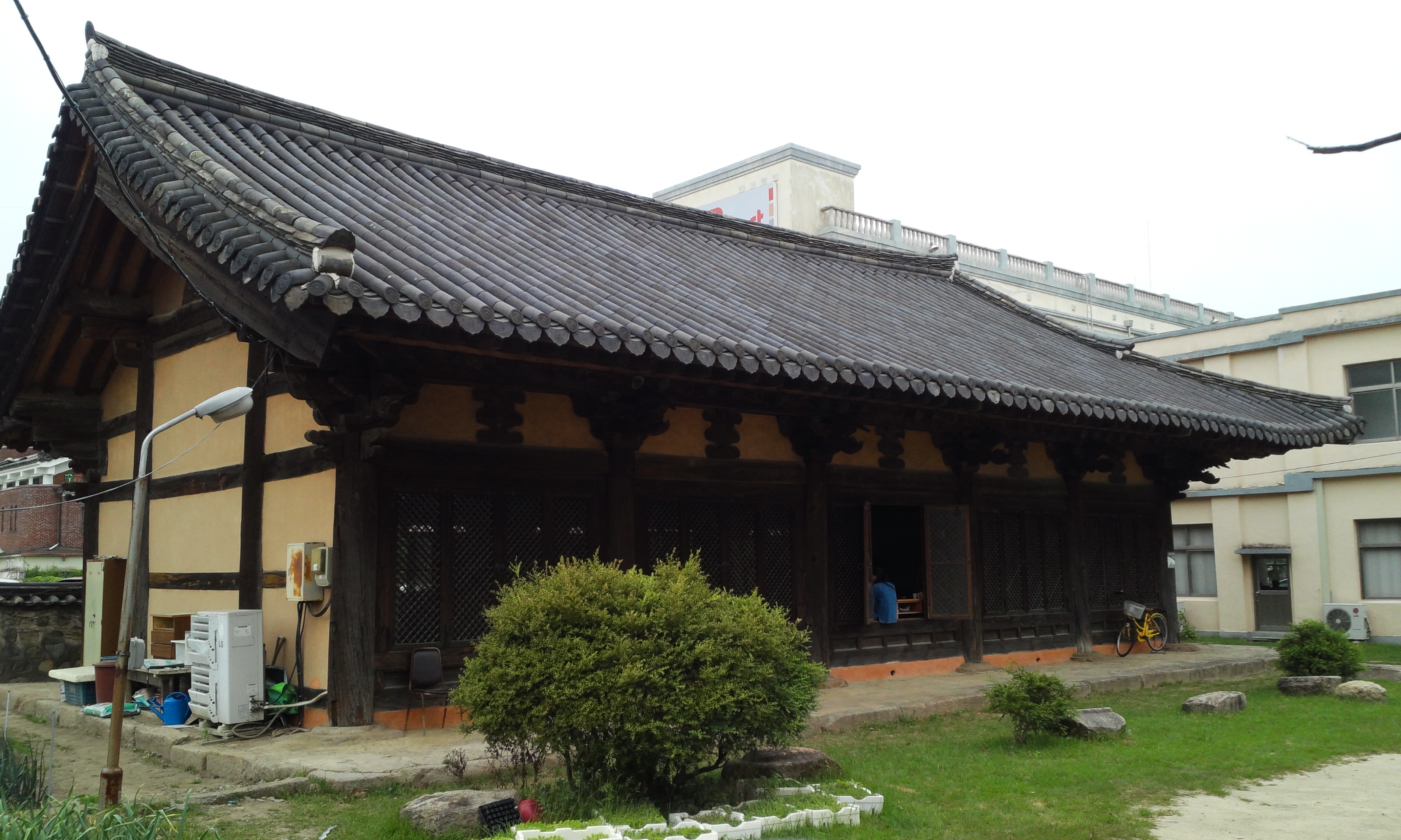 동경관의 현재 모습